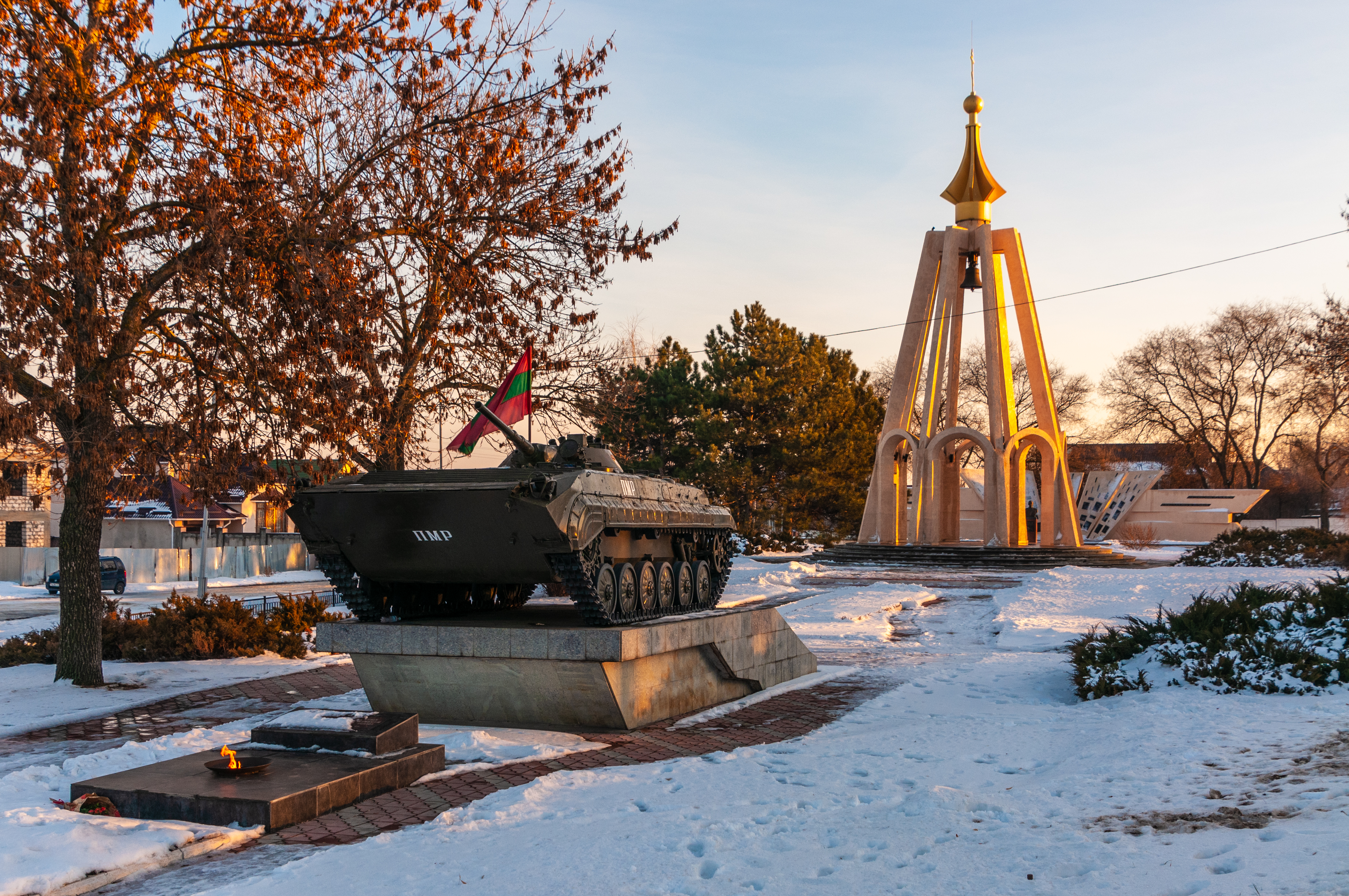 Bender, Pridnestrowien, Panzerdenkmal